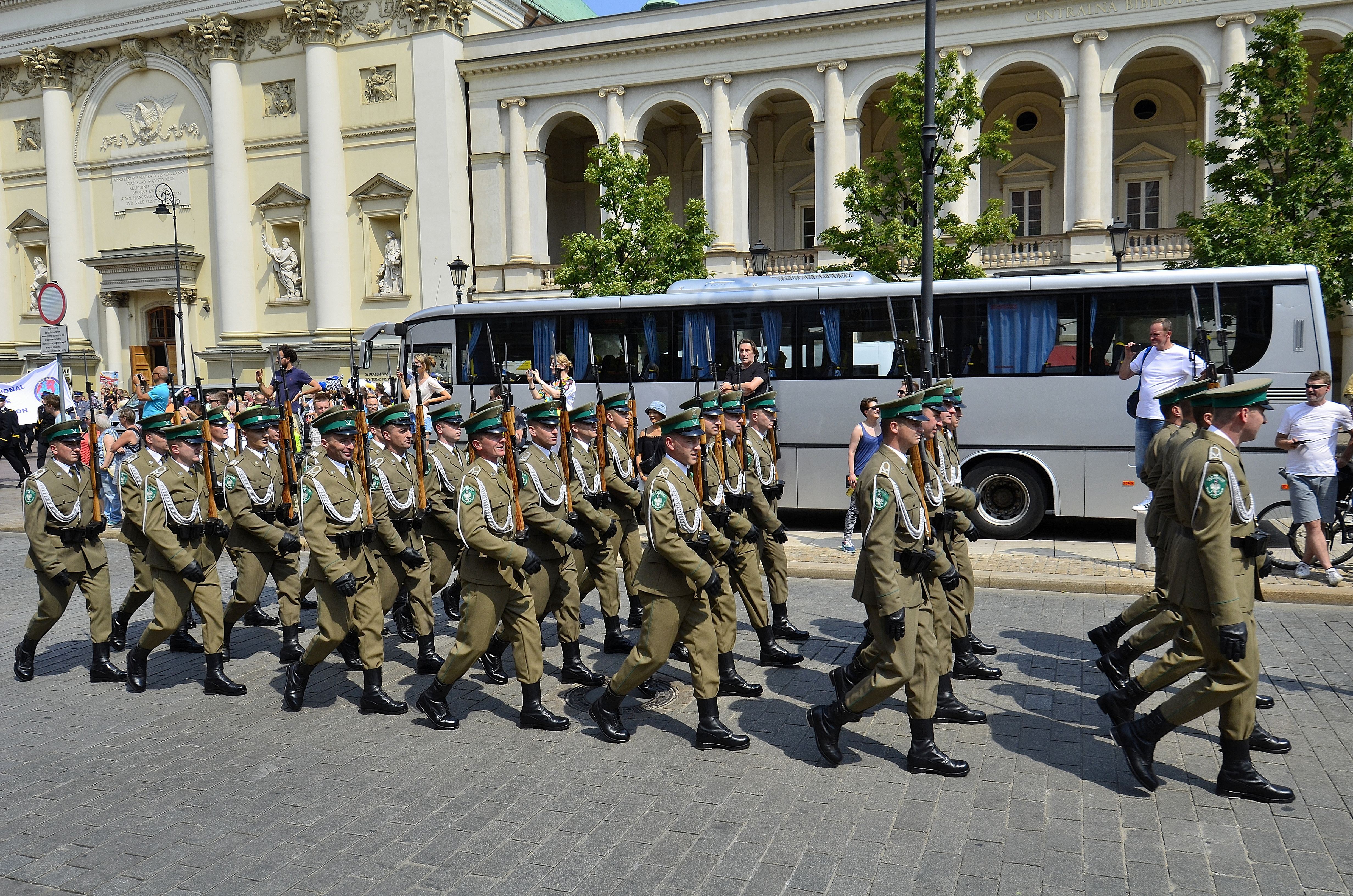 Funkcjonariusze Straży Granicznej na Krakowskim Przedmieściu w Warszawie